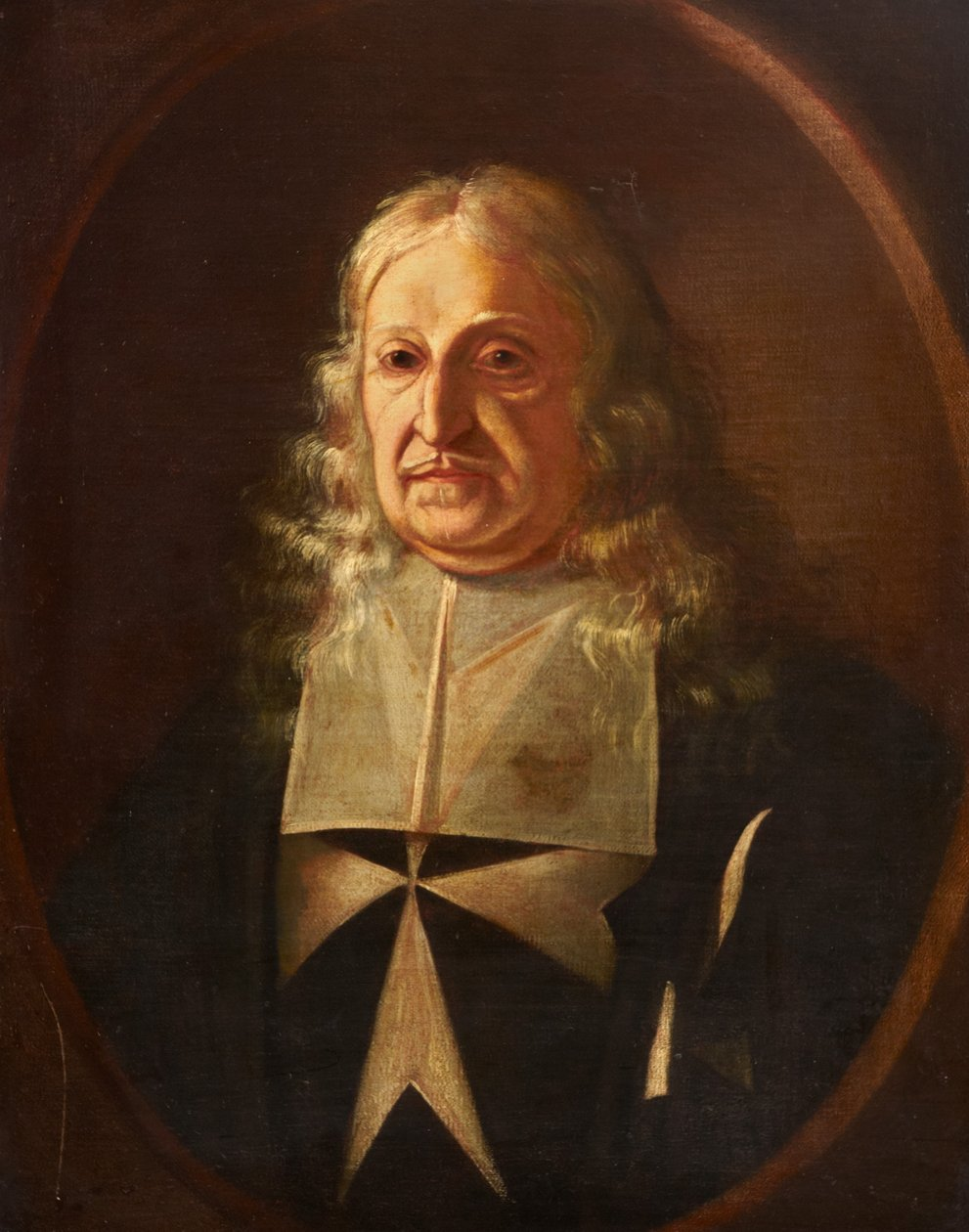 Anonyme, Portrait de Gregorio Carafa, grand-maître de l'ordre de Malte, seconde moitié du XVIIe siècle, huile sur toile, 82 x 64 cm, Londres, Museum of the Order of St John.